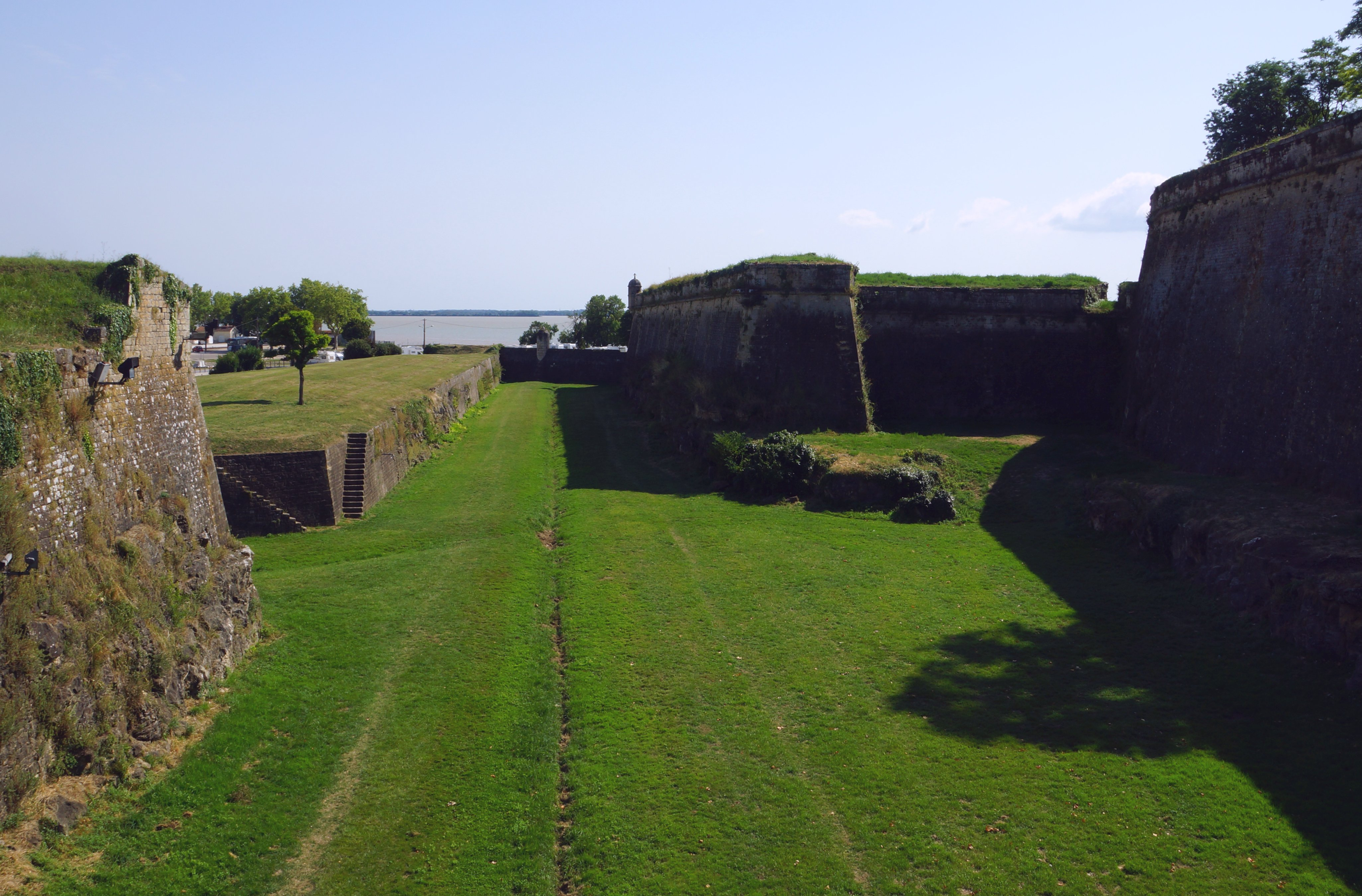 Zitadelle von Blaye, errichtet von 1680 bis 1689 als "Citadelle de Blaye" auf vorschlag von 'Vauban' als Festung an der Gironde zum Schutz des Hafens von Bordeaux in der heutigen region Aquitaine, France. Foto Wolfgang Pehlemann DSC08867